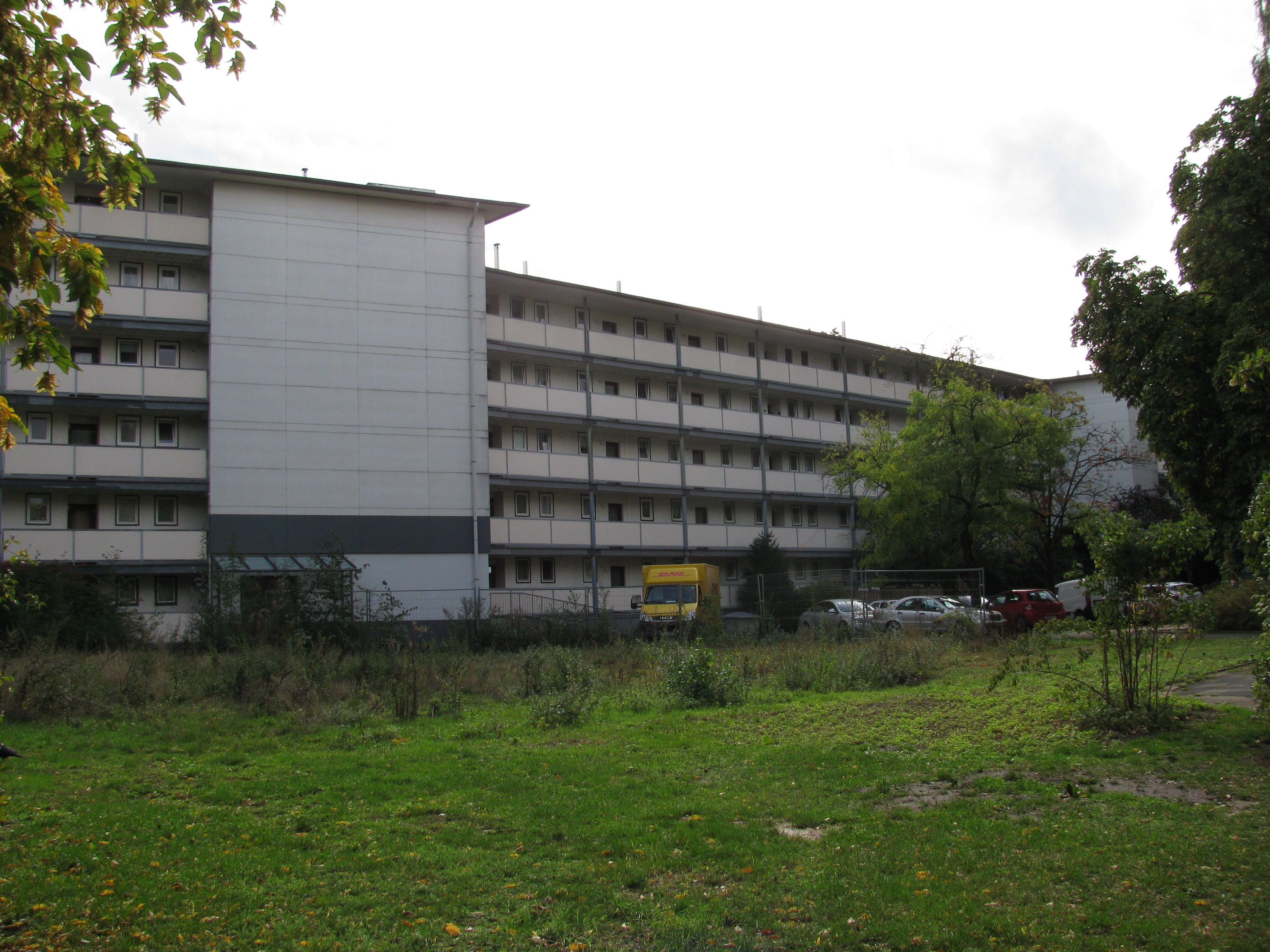 das Haus Washingtonweg 1 in Hannover